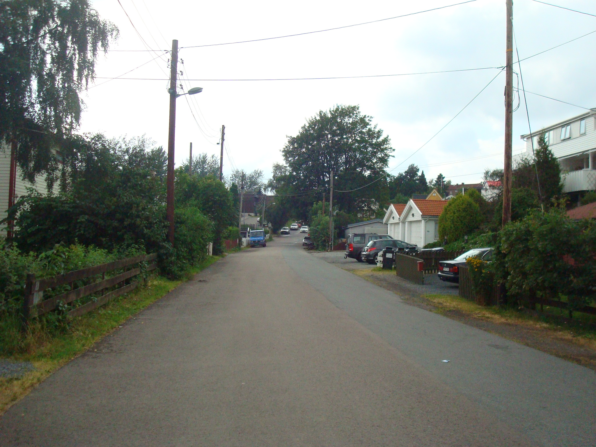 Ribstonveien i Oslo